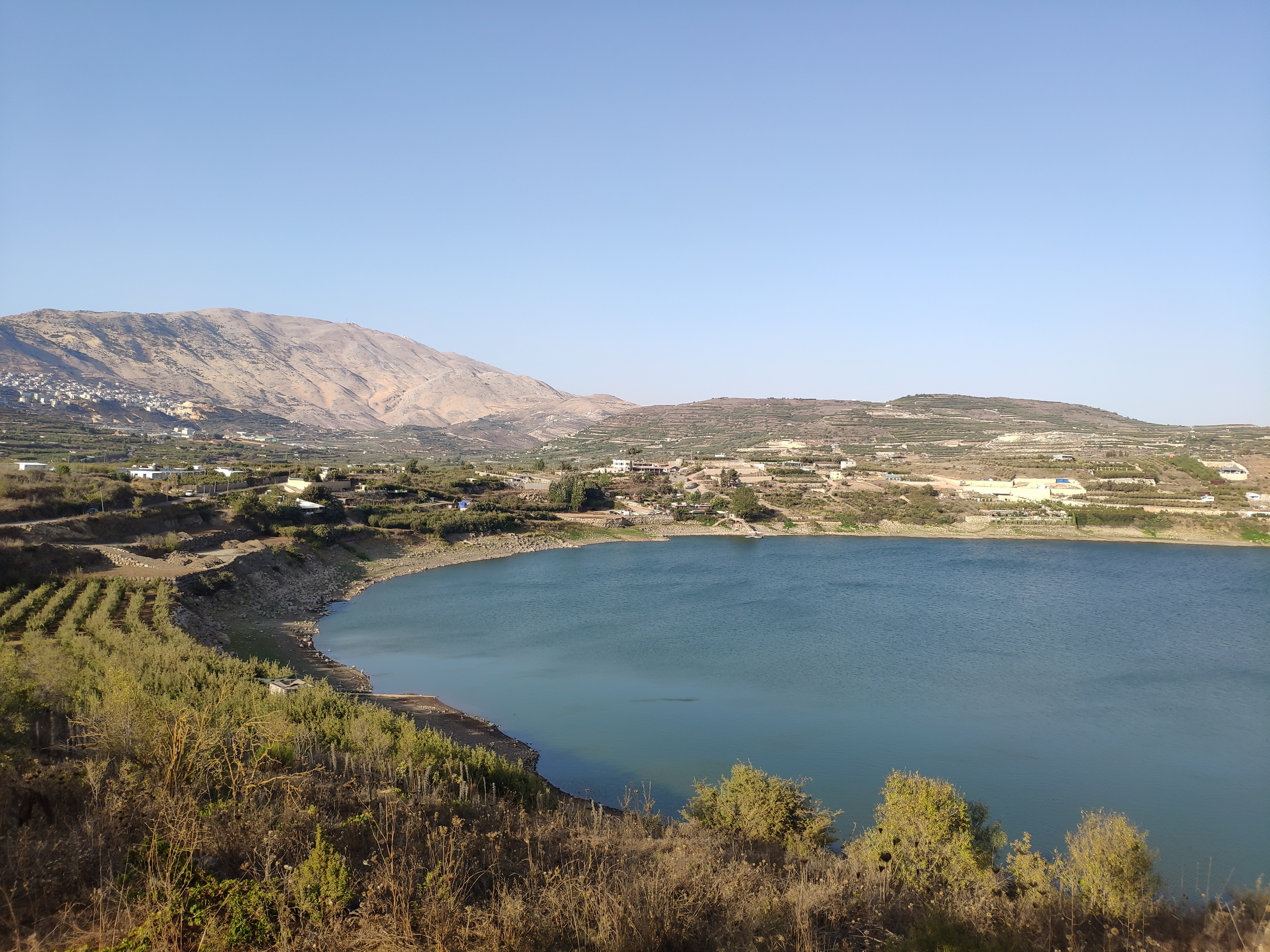 בריכת רם, ברקע החרמון